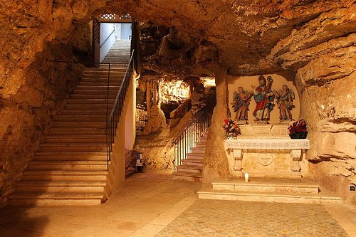 Scalinata della Grotta di Turi o Grotta di Sant'Oronzo, patrono di Turi. A destra, l'altare con pavimento in maioliche.